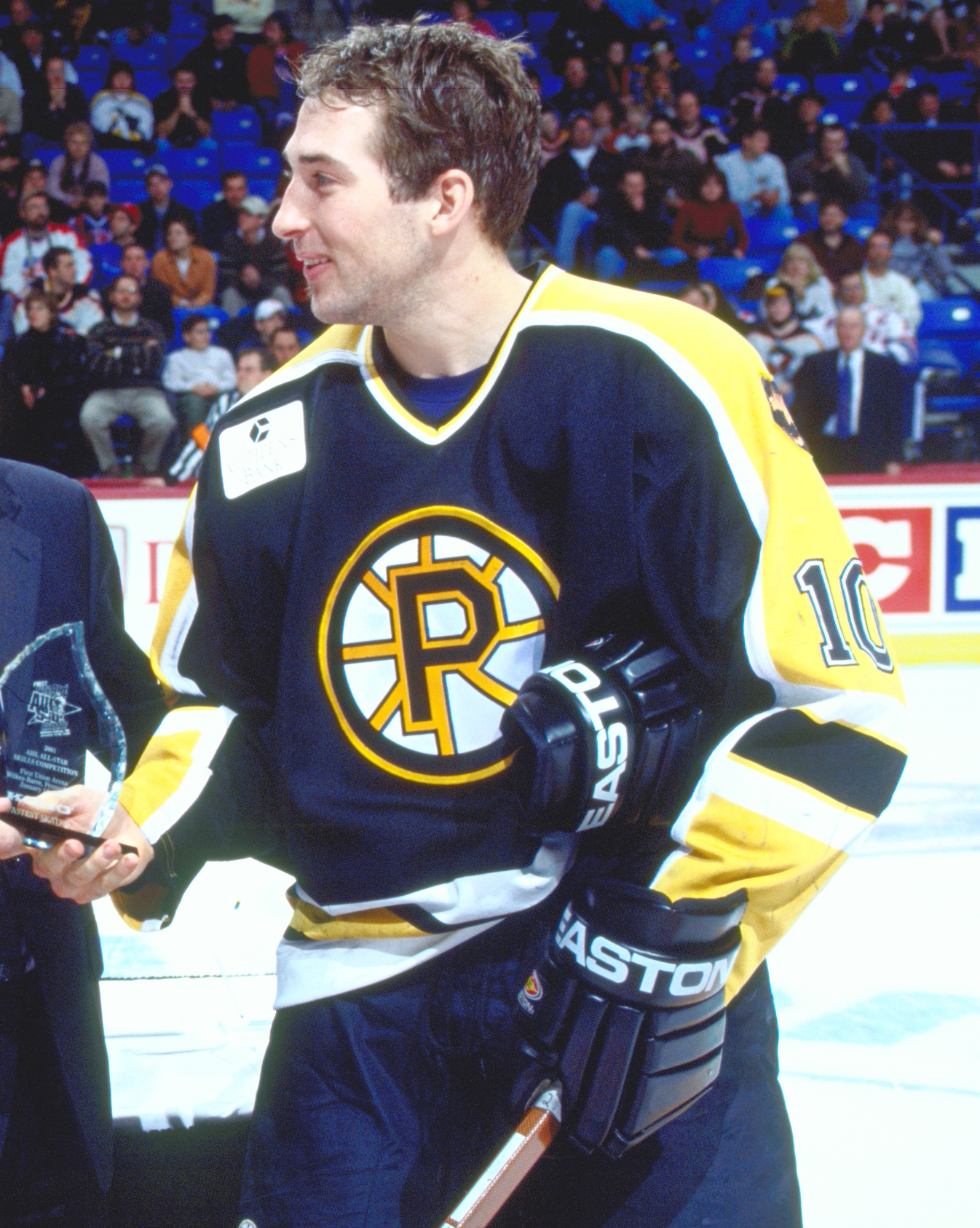 ahlstar0116